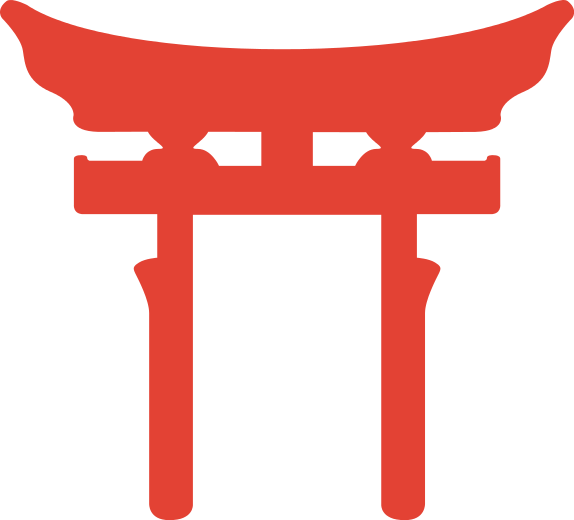 Billedet er fra en religiøs shinto tegning